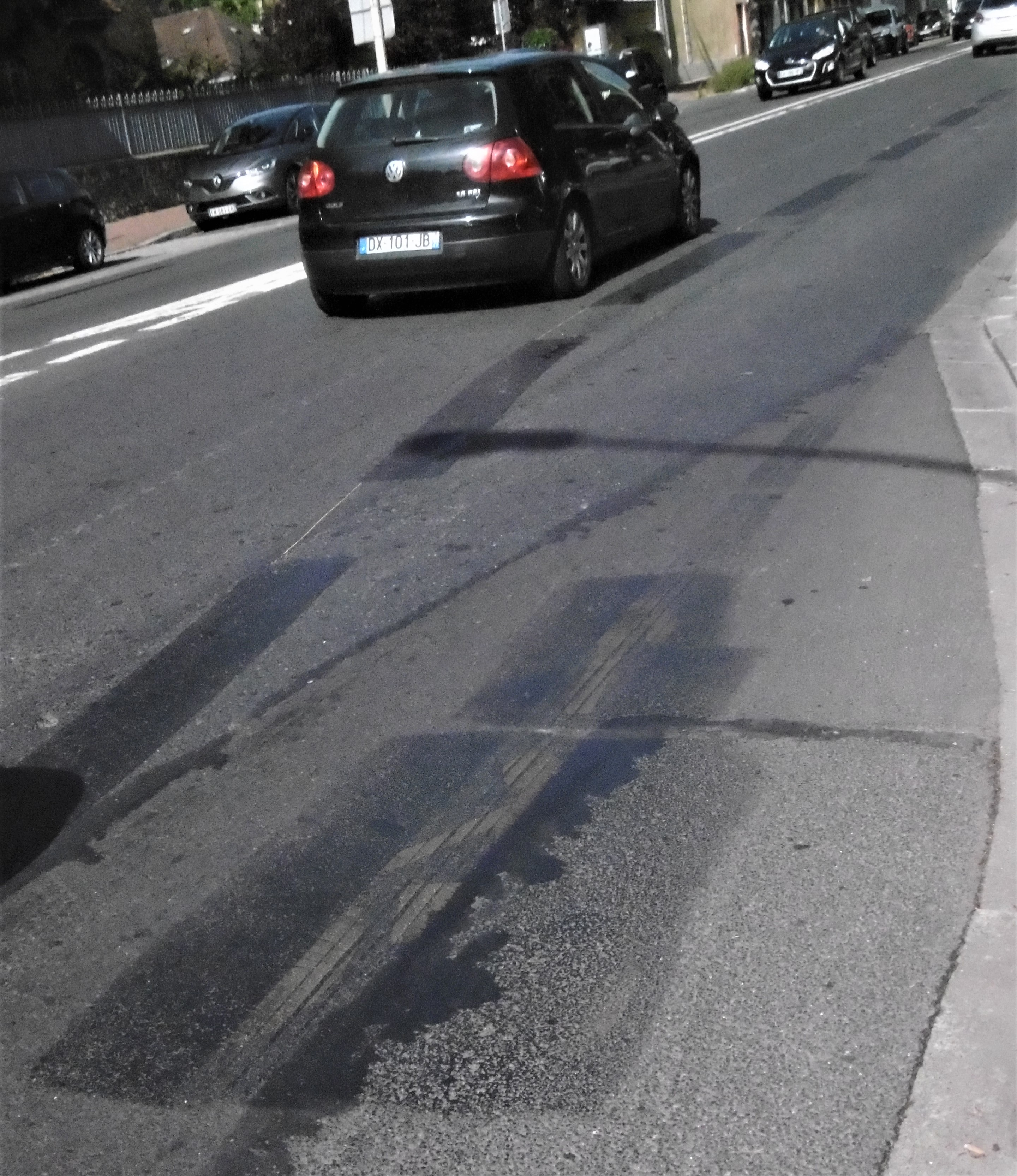 Traces de marquages de piste Covid supprimée à Chatou avenue du Maréchal Foch (juillet 2020)